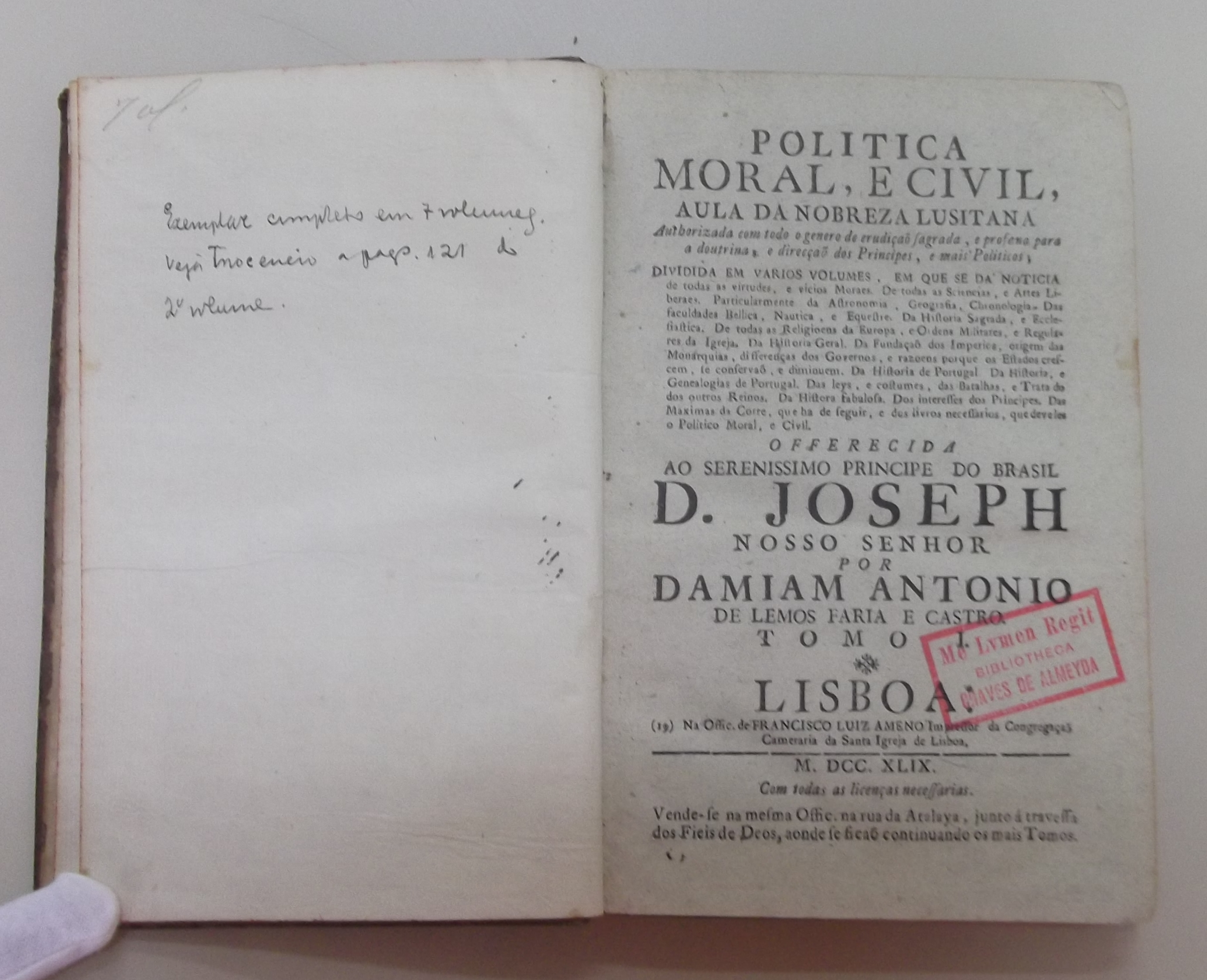 Castro, Damião de Lemos de Faria e ; Ameno, Francisco Luiz. Politica moral, e civil, aula da nobreza lusitana. Lisboa : Offic. de Francisco Luiz Ameno [...], 1749-1761. 7 v.